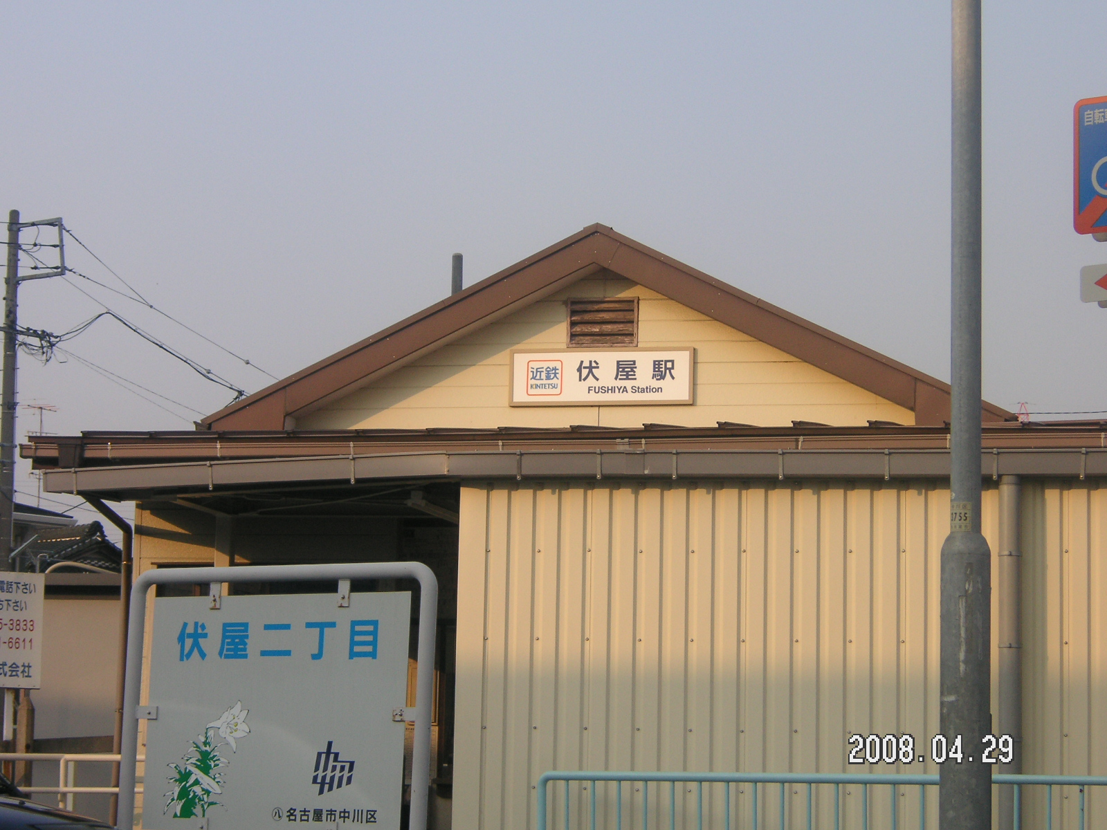 近鉄・伏屋駅